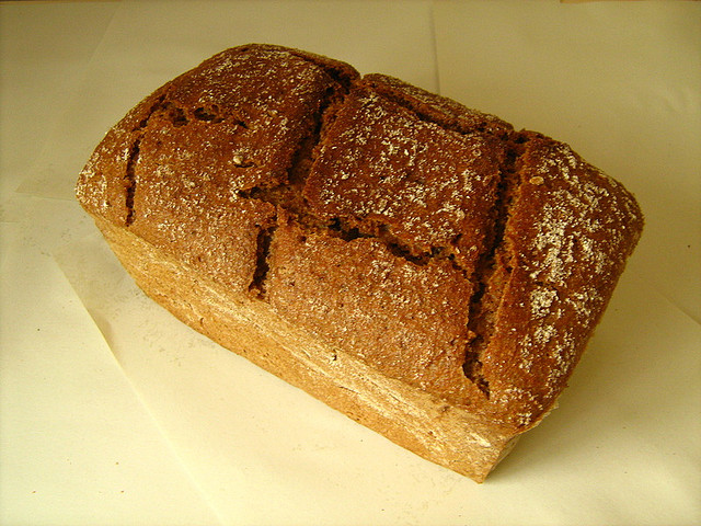 Roggenbrot